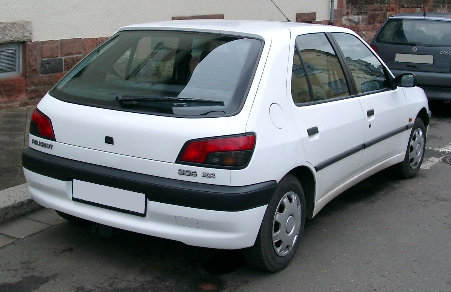 Peugeot 306 XR